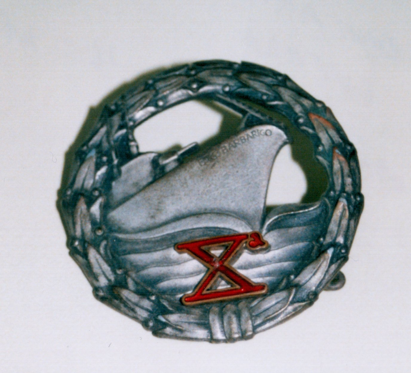 Spilla del battaglione Barbarigo della divisione X MAS, che combattè per la Repubblica Sociale Italiana organizzata da Benito Mussolini.